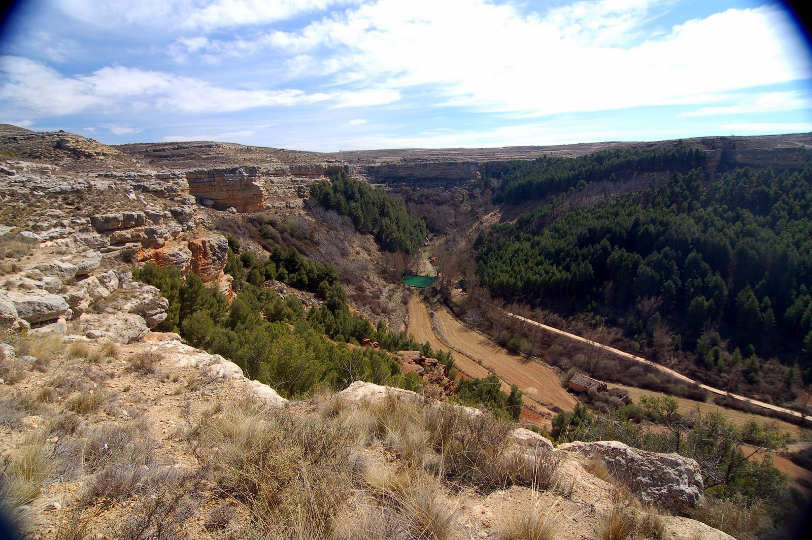 El Arguilay en Baguena.